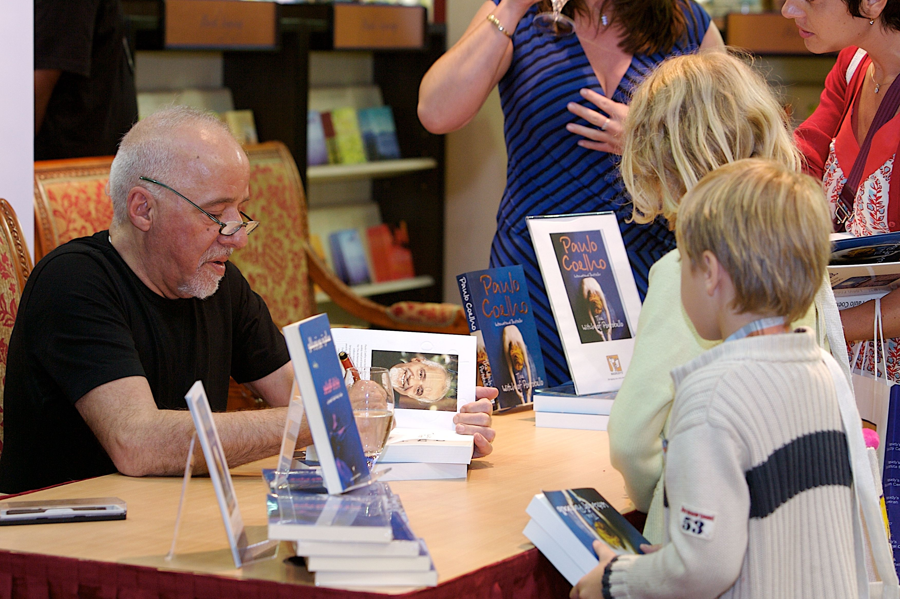 Firma libros Paulo Coelho